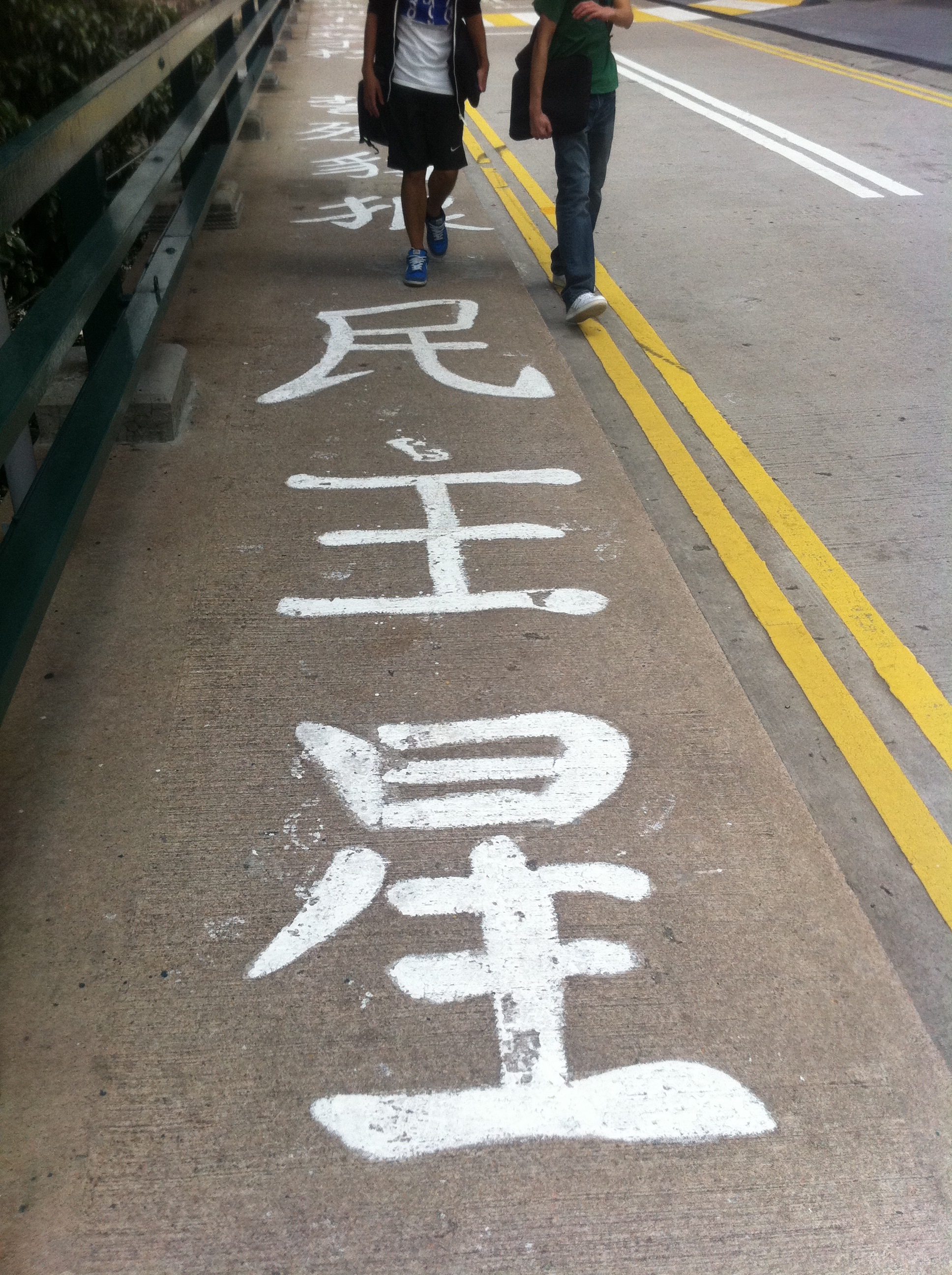 中文（香港）: HKU 太古橋 的言論自由